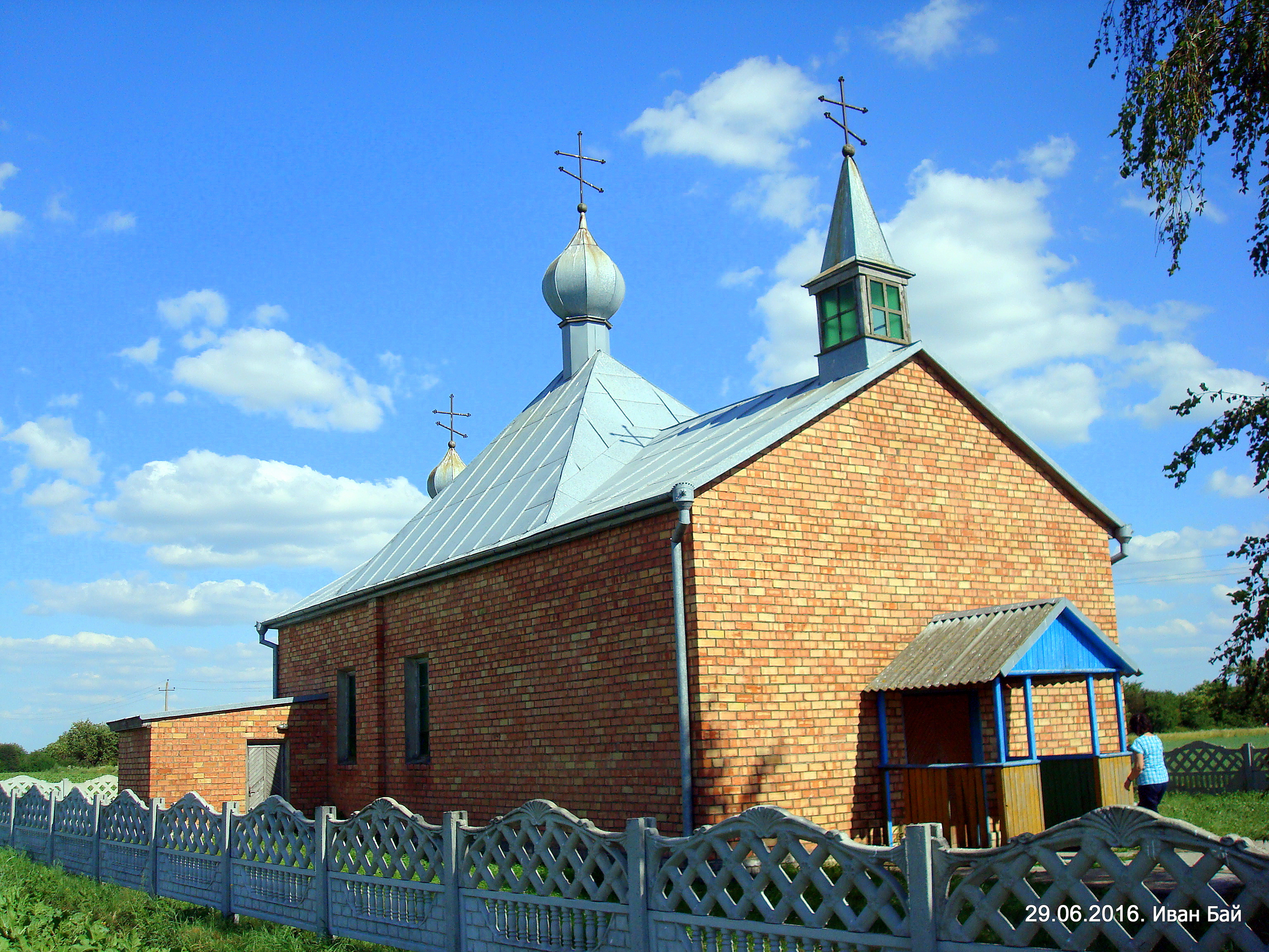 Церковь Святого Георгия